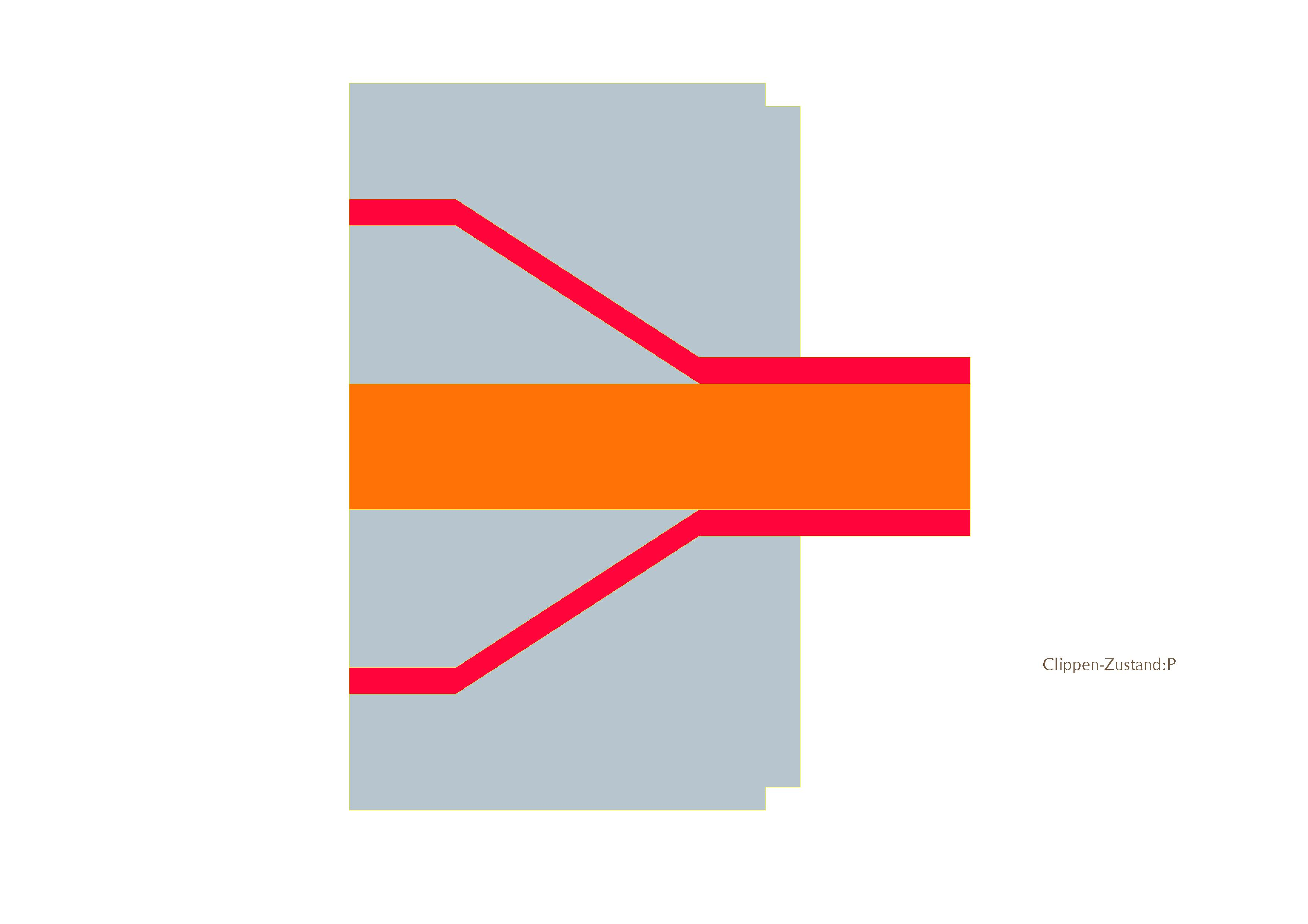 Druckummantelung